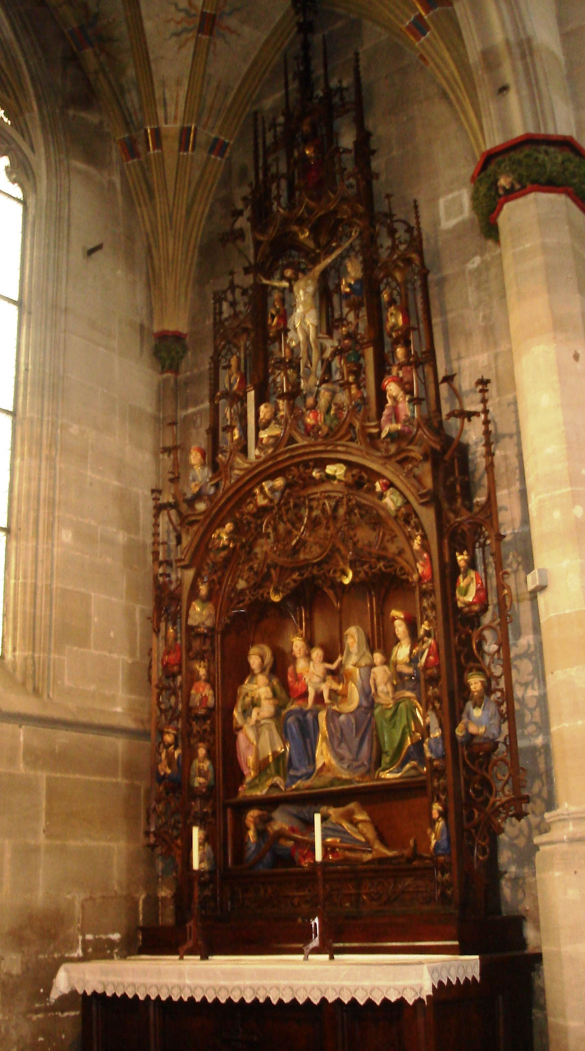 Sippenaltar in der Sebalduskapelle im Heilig-Kreuz-Münster zu Schwäbisch Gmünd